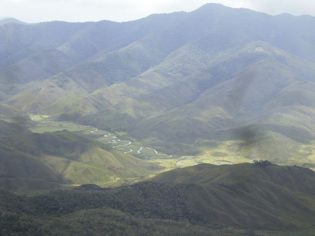 Valle Belén, Provincia de Luya, Región Amazonas, Perú